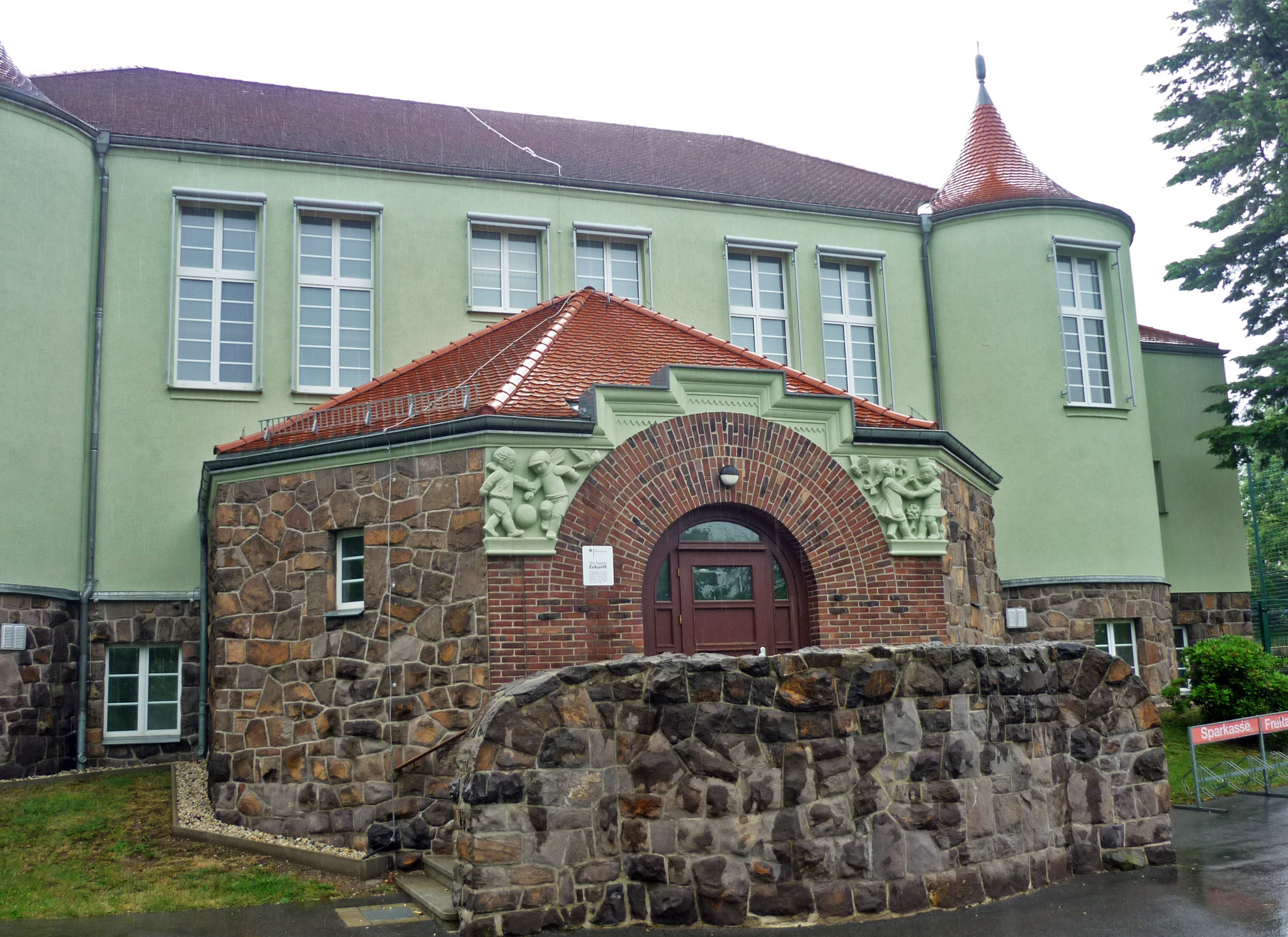 Turnhalle auf der Lukas-Cranach-Str. 58g in Freital-Potschappel